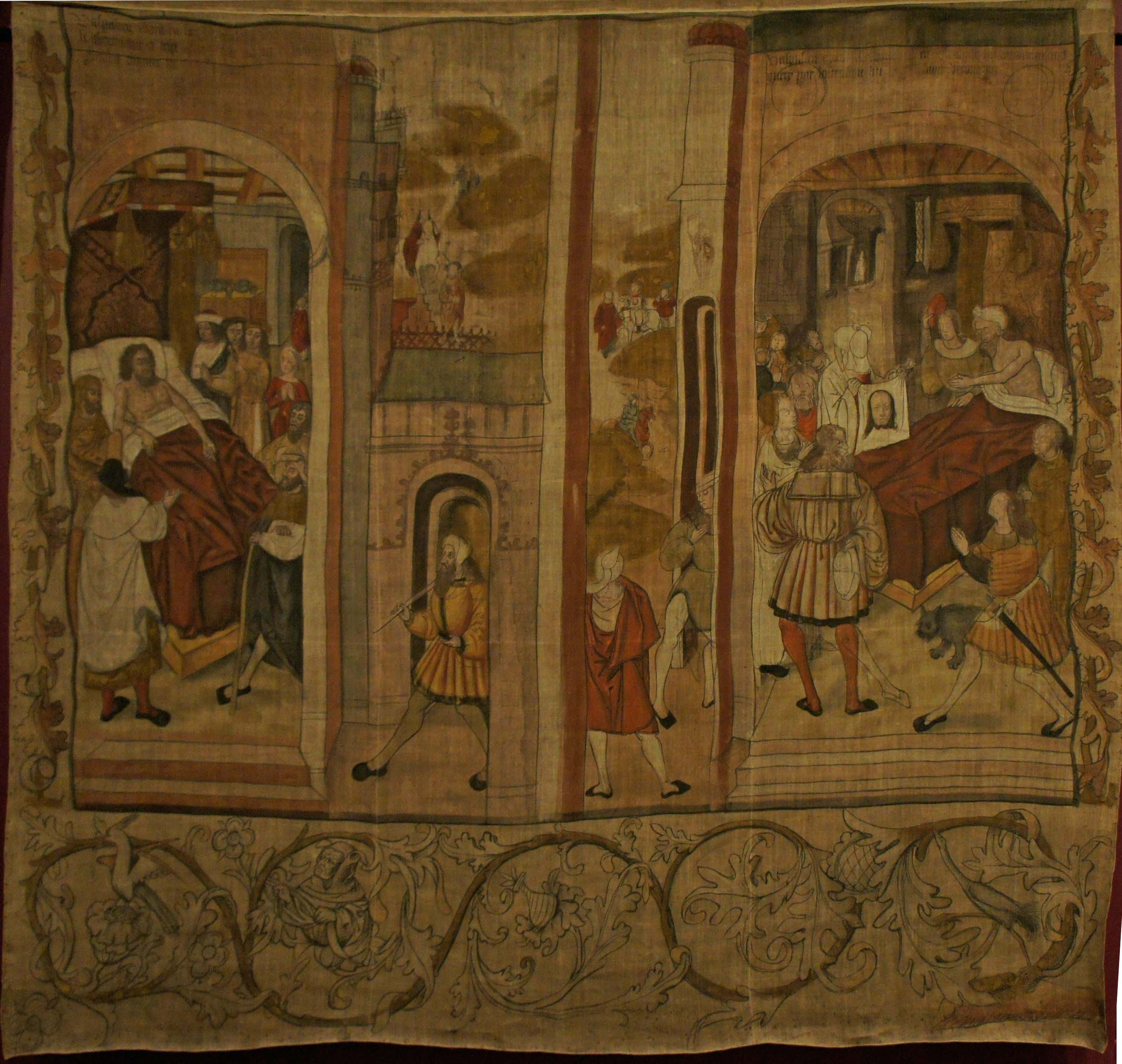 Don des Hospices de Reims, tapisserie représentant Vespasien atteint de la lèpre.